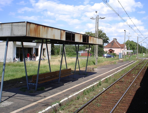 Przystanek kolejowy w Szachach (woj. lubelskie) przed modernizacją.